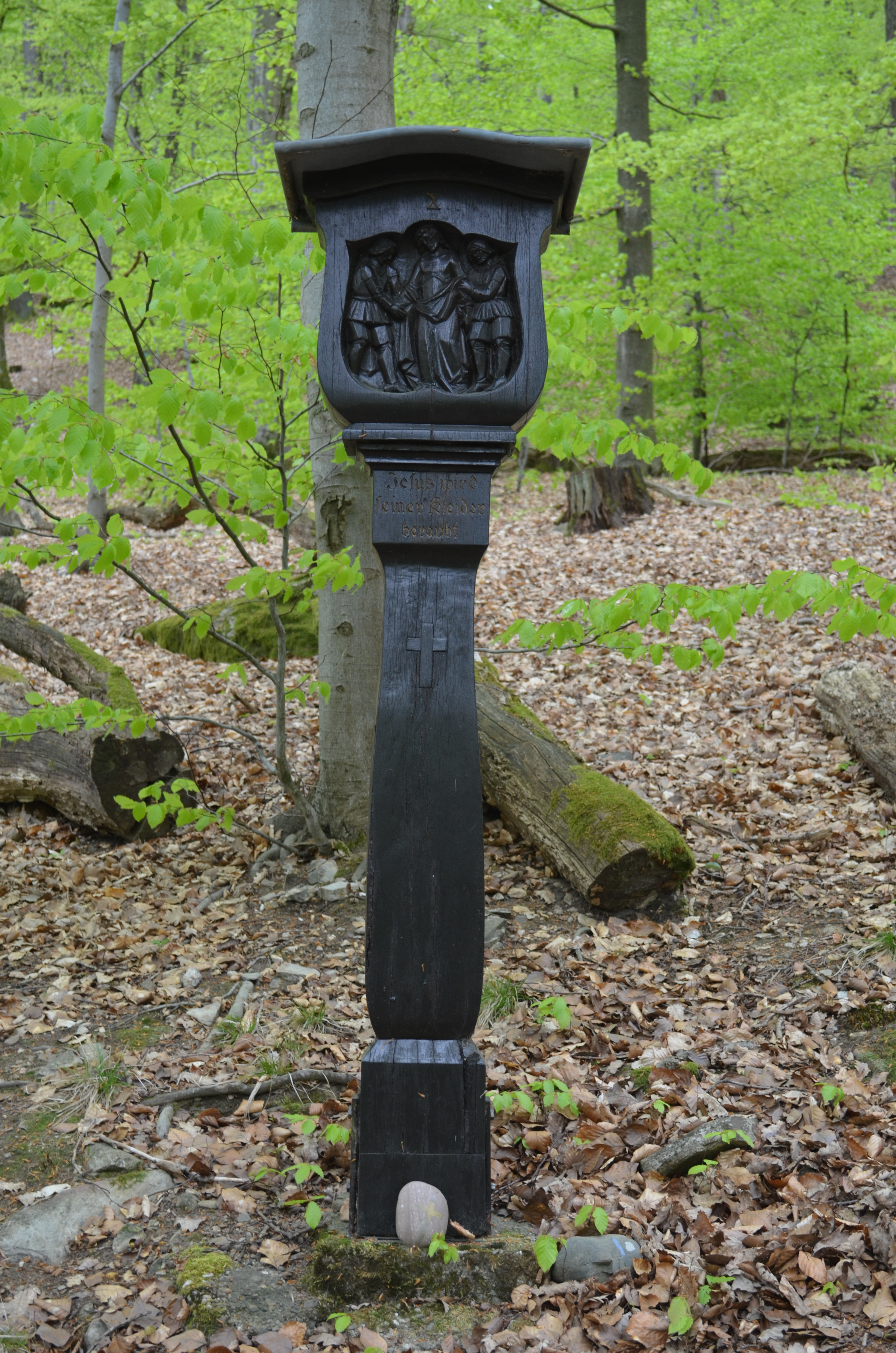 Königstein, Kreuzweg Romberg, Station 10